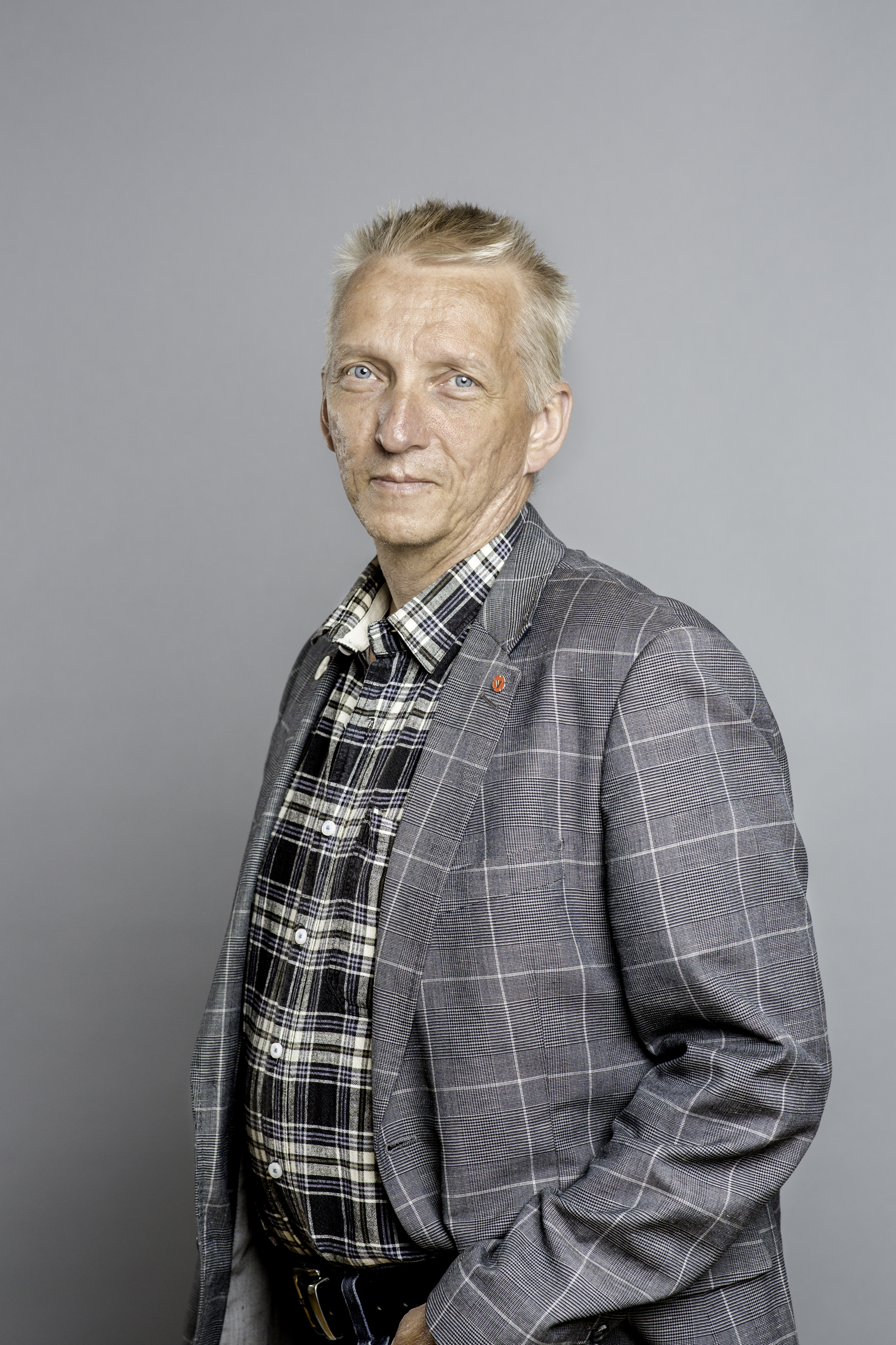 Birger Lahti. Vänsterpartiet. 2018.